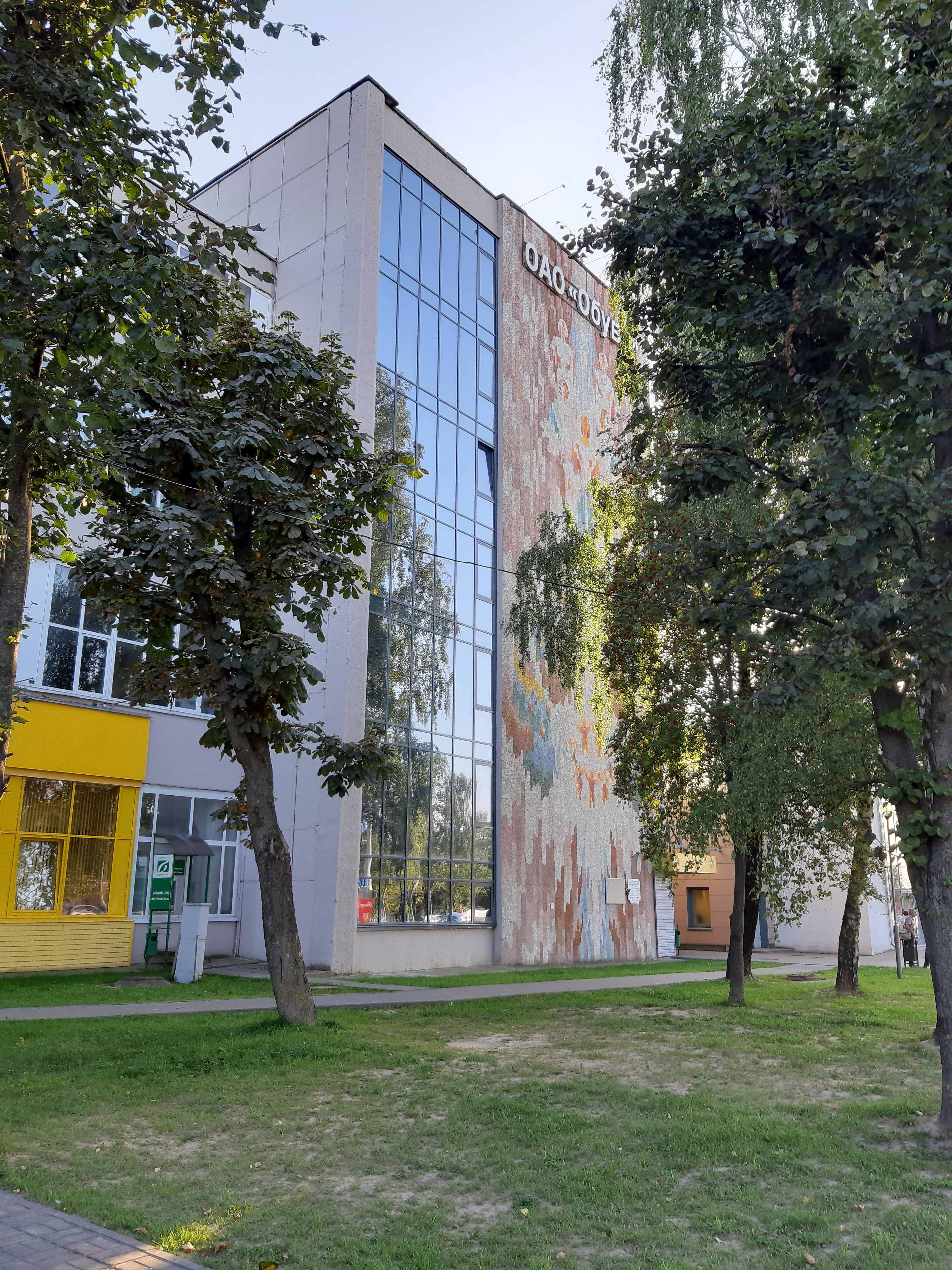 Магілёў. Па вул. Якубоўскага